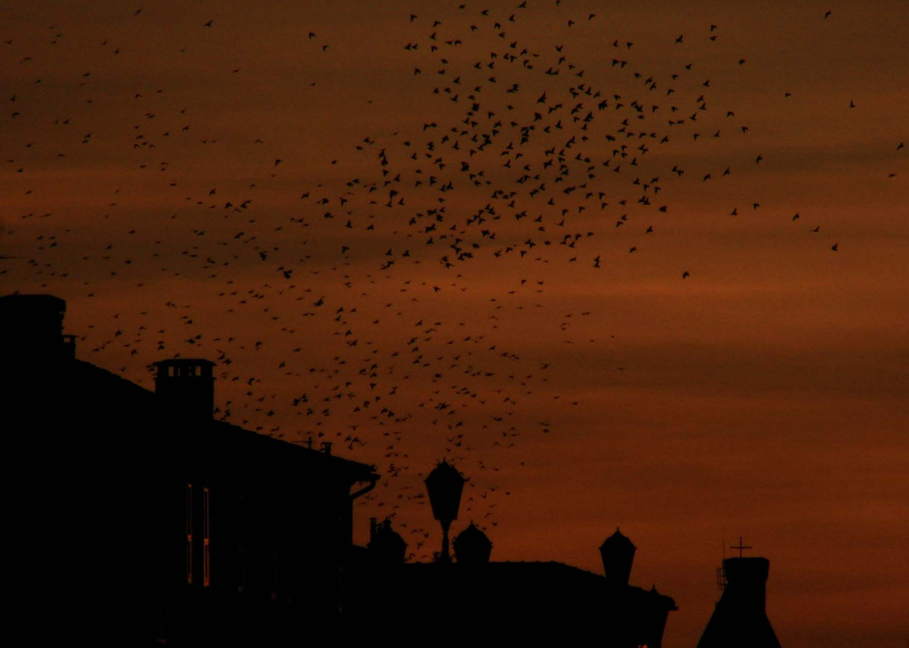 Storni al tramonto che raggiungono i dormitori. Foto scattata da me (Pepp.cristiano 18:26, 25 apr 2007 (CEST), Giuseppe Cristiano), la rilascio nel pubblico dominio.